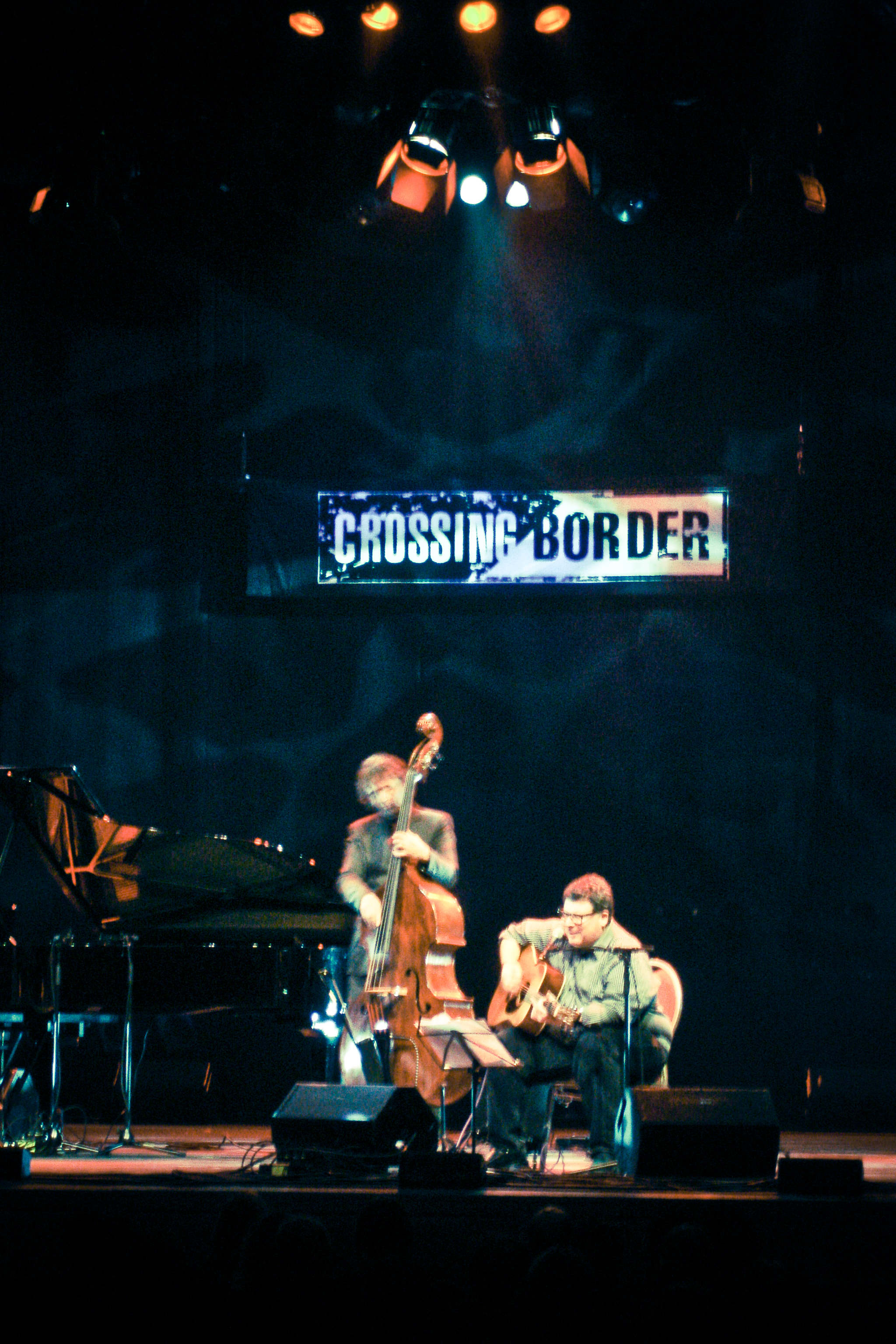 @ Crossing Border 2008